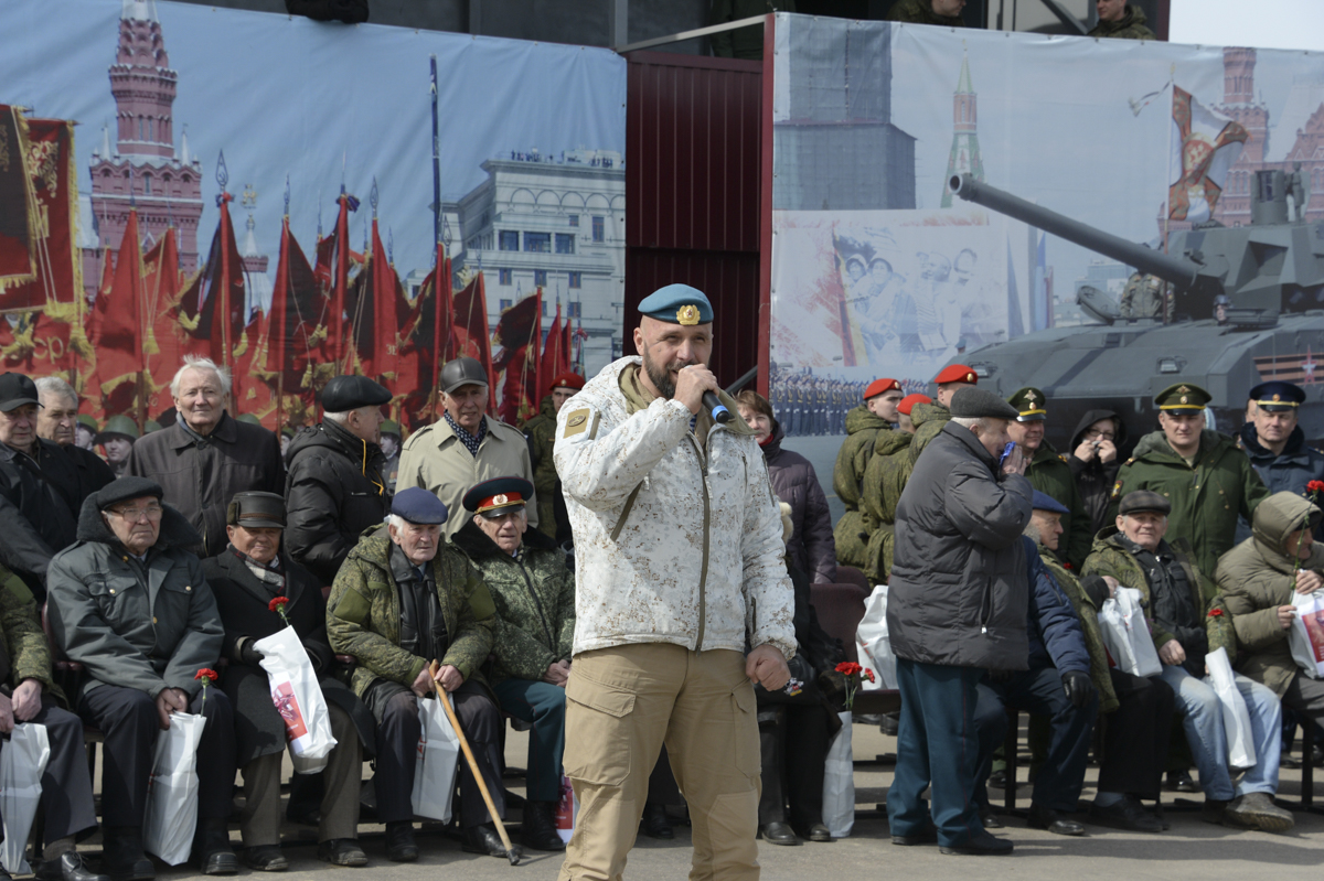 Автор-исполнитель Вячеслав Корнеев. Военно-патриотическая акция «Под Знаменем Победы». Выступление для ветеранов Великой Отечественной войны и участников военного парада в День Победы. Алабино